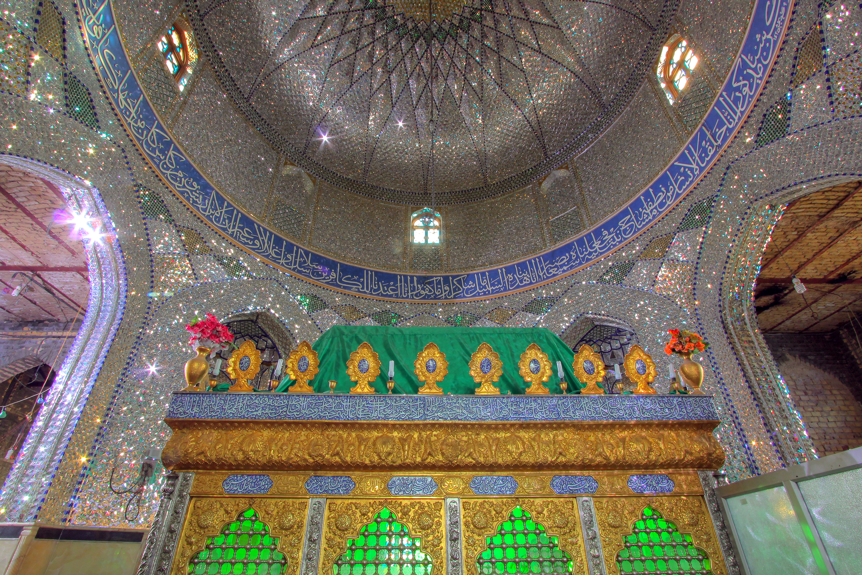 امامزاده شاه جمال در قم، ابتدای ورودی جاده اراک به شهرستان قم واقع شده و این اثر در تاریخ ۲۵ اسفند ۱۳۷۹ با شمارهٔ ثبت ۳۳۴۴ به‌عنوان یکی از آثار ملی ایران به ثبت رسیده است.